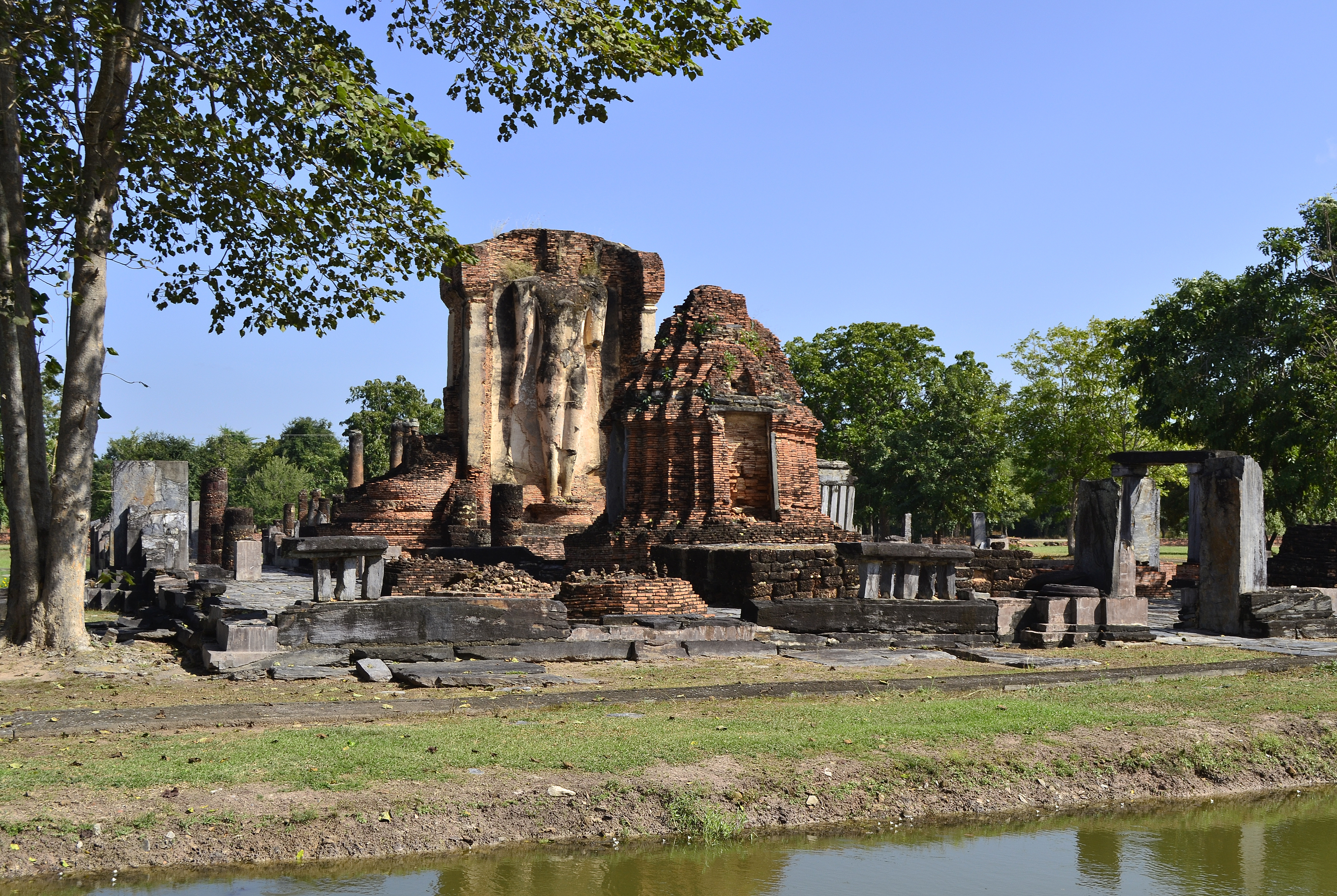 Wat Chetuphon im Geschichtspark Sukhothai